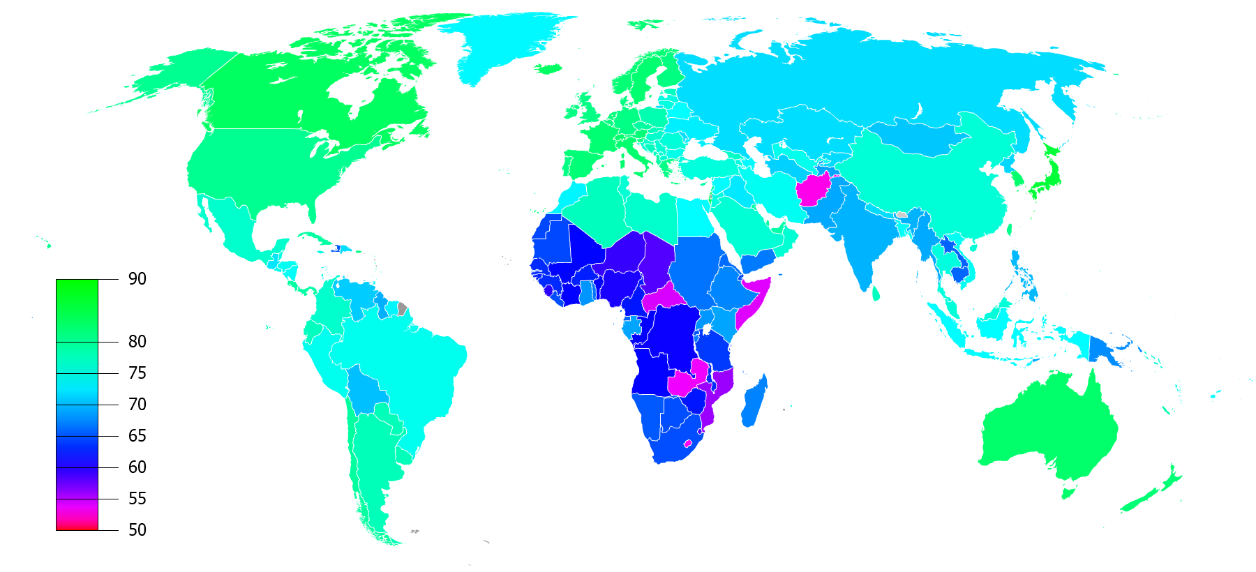 2020年の国・地域別平均寿命